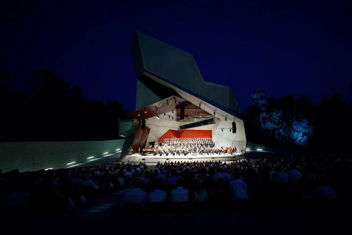 Carmina burana Wolkenturm Grafenegg 2015